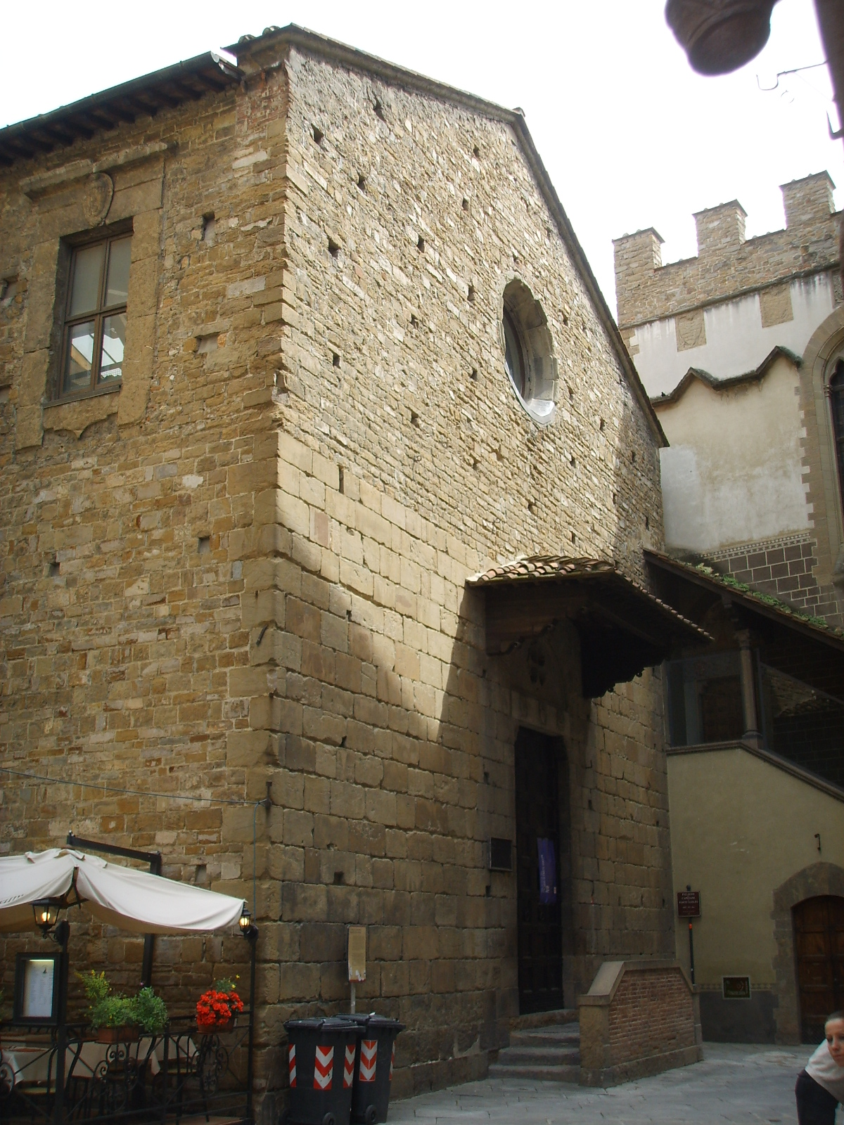 Santa Maria Sopra Porta